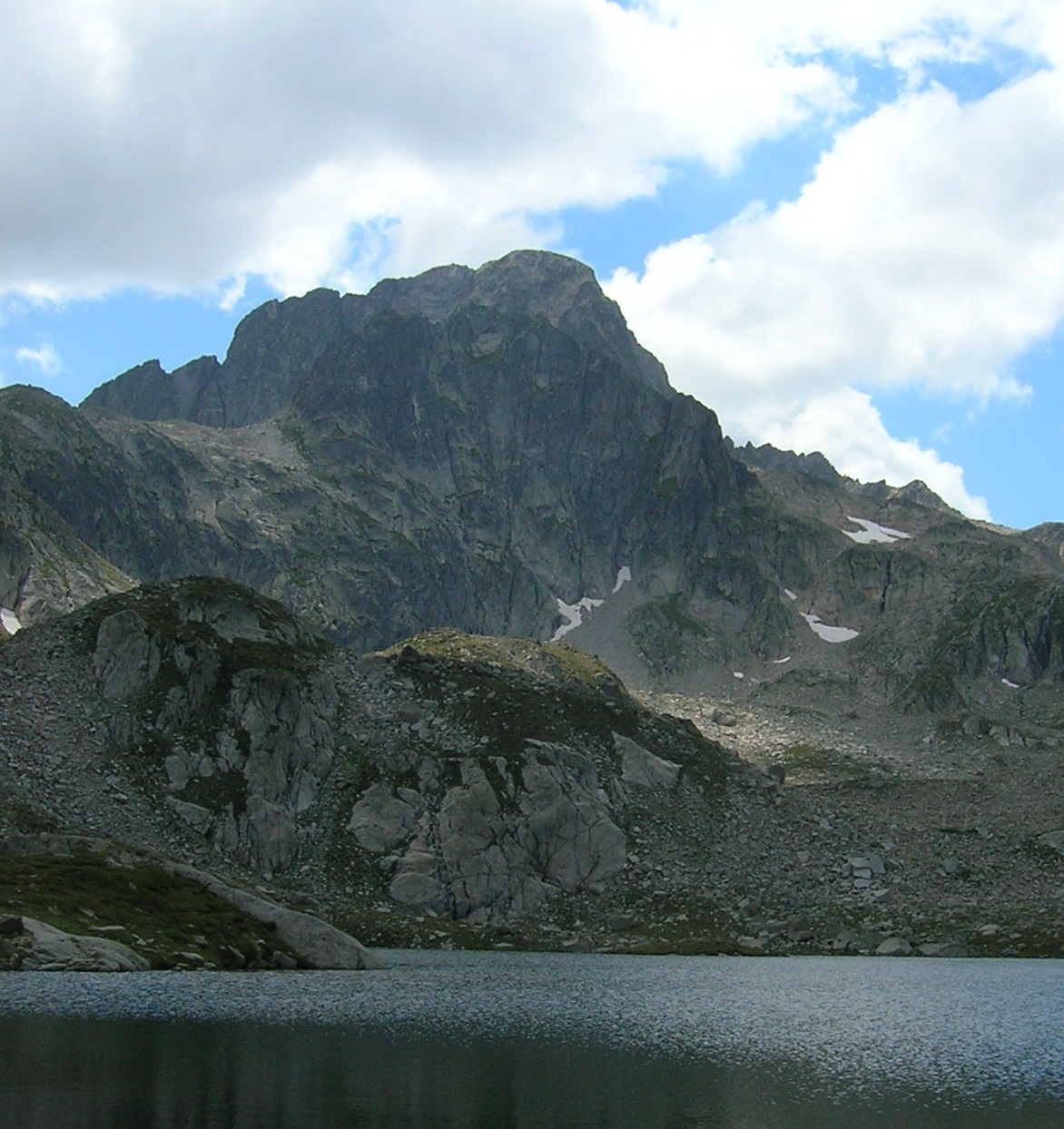 lac et pic de Cambales